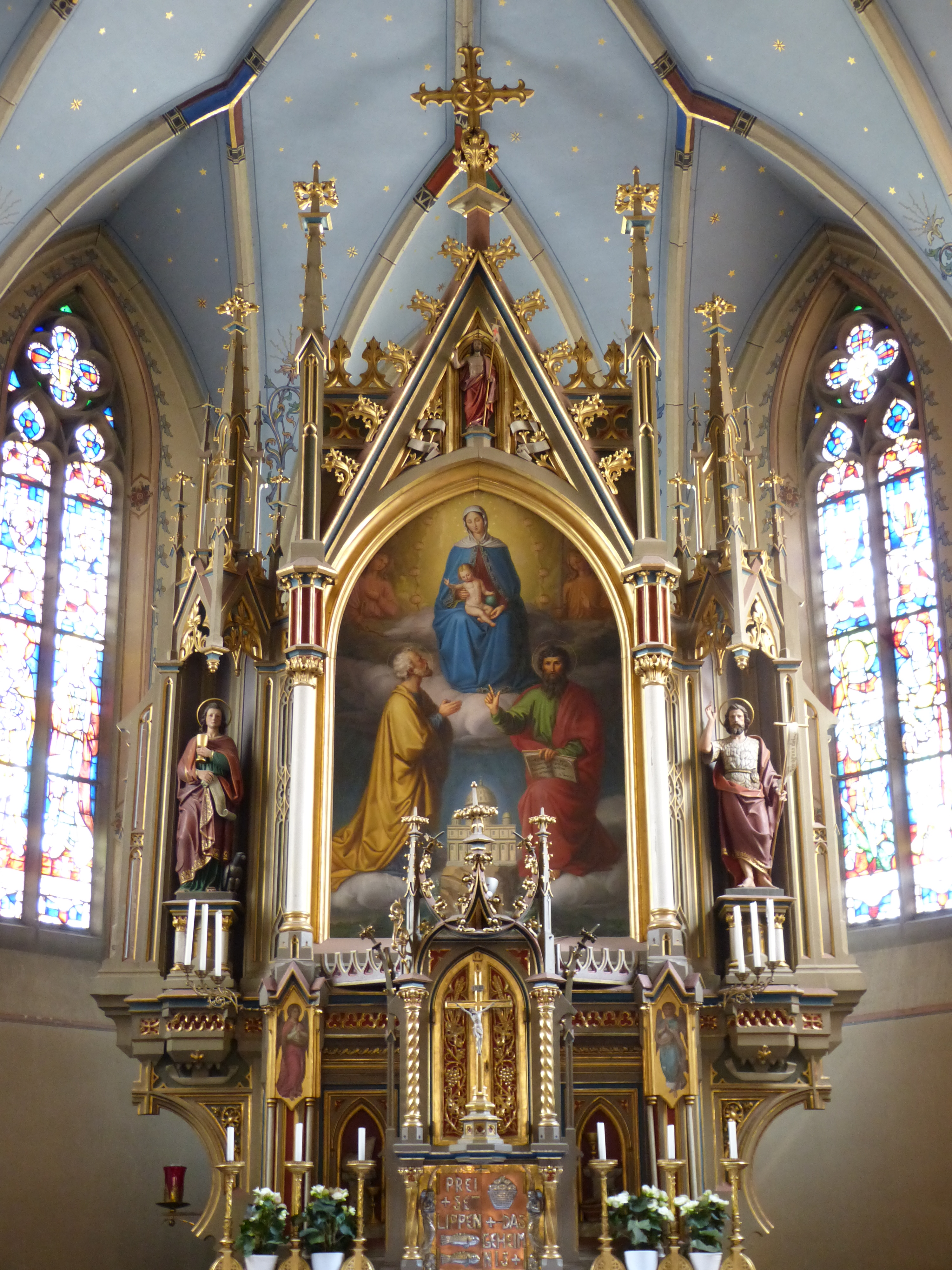 St. Peter und Paul, Zell, Gemeinde Bad Grönenbach, Landkreis Unterallgäu, Bayern